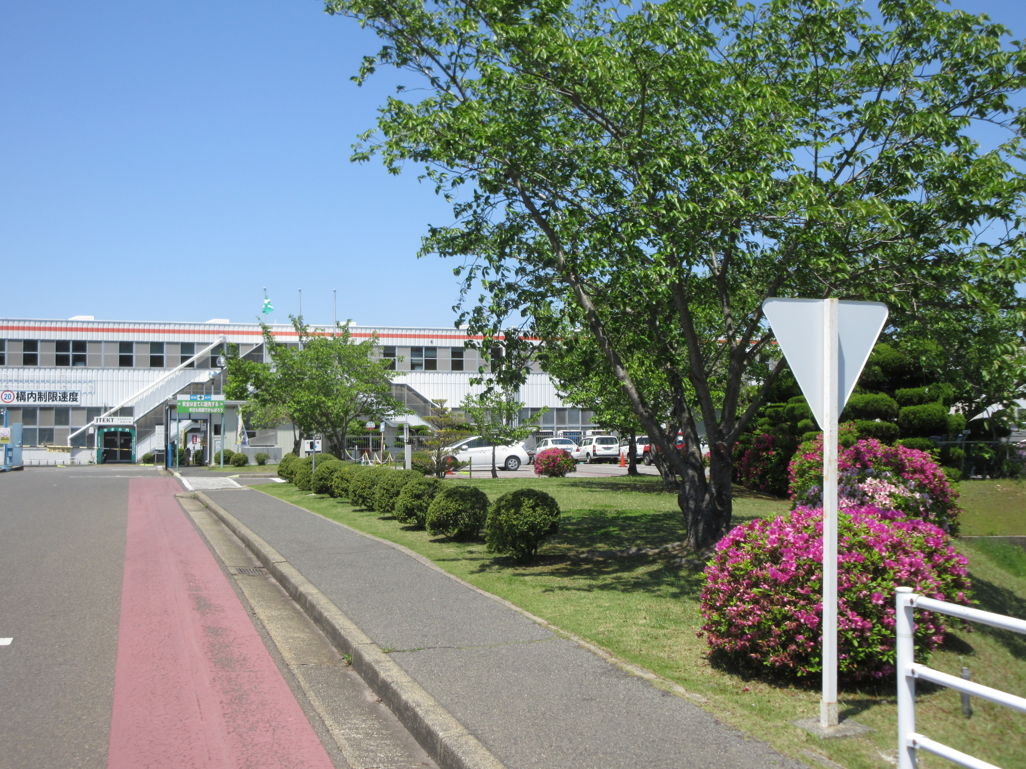 ジェイテクト岡崎工場（岡崎市市場町）